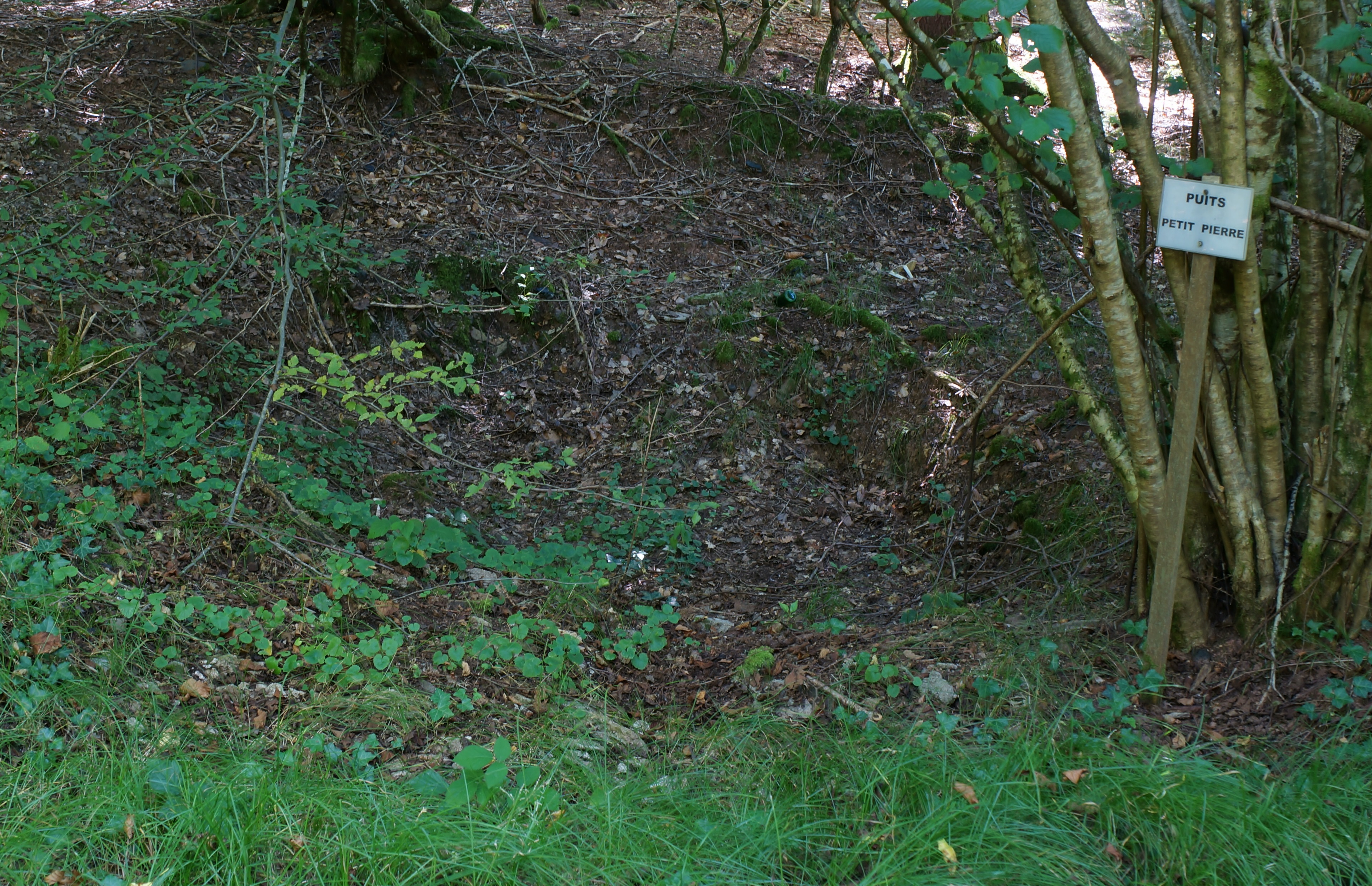 Le puits Petit Pierre.